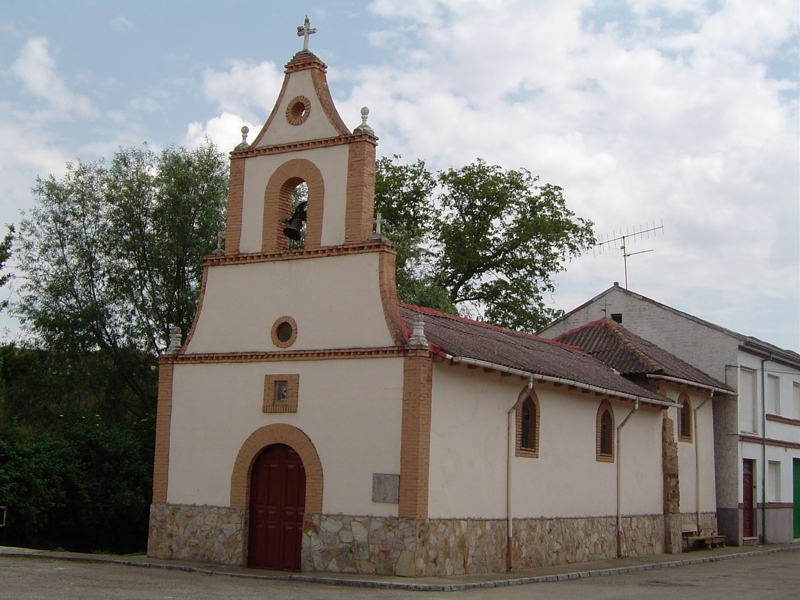 Ermita de Villoria de Órbigo